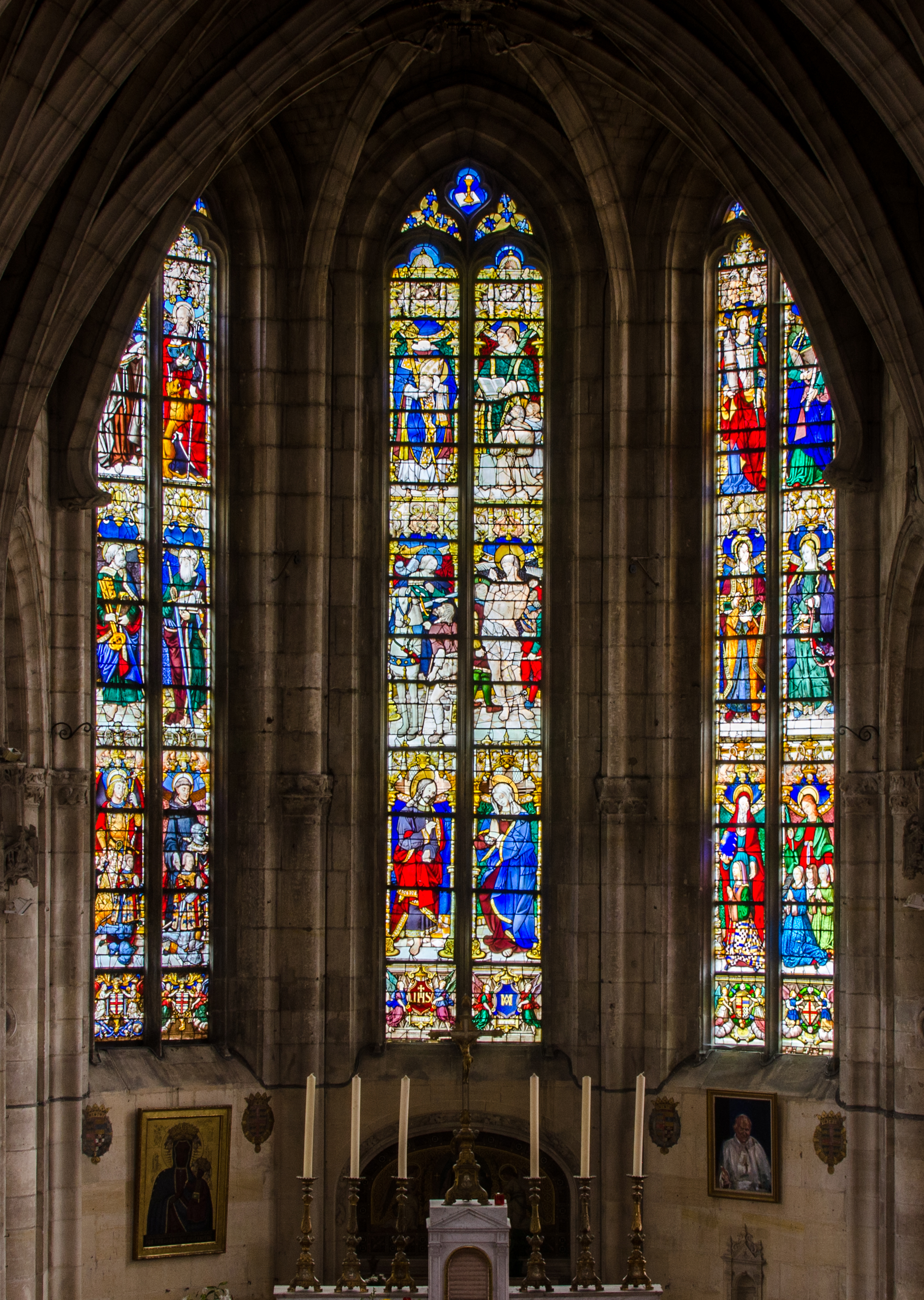 Vitraux du choeur de la collégiale de Montmorency